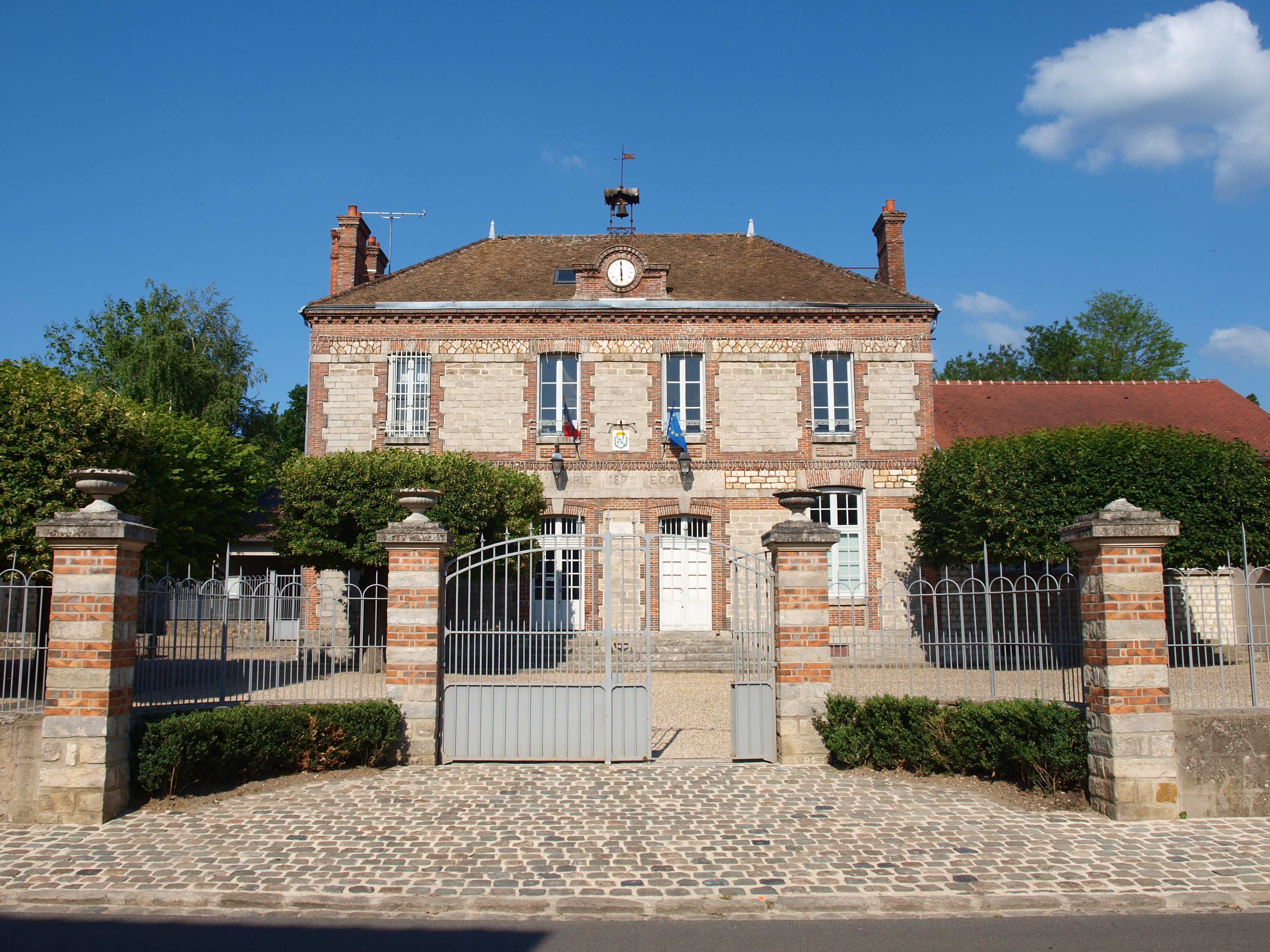 Fleury-en-Bière (Seine-et-Marne, France)